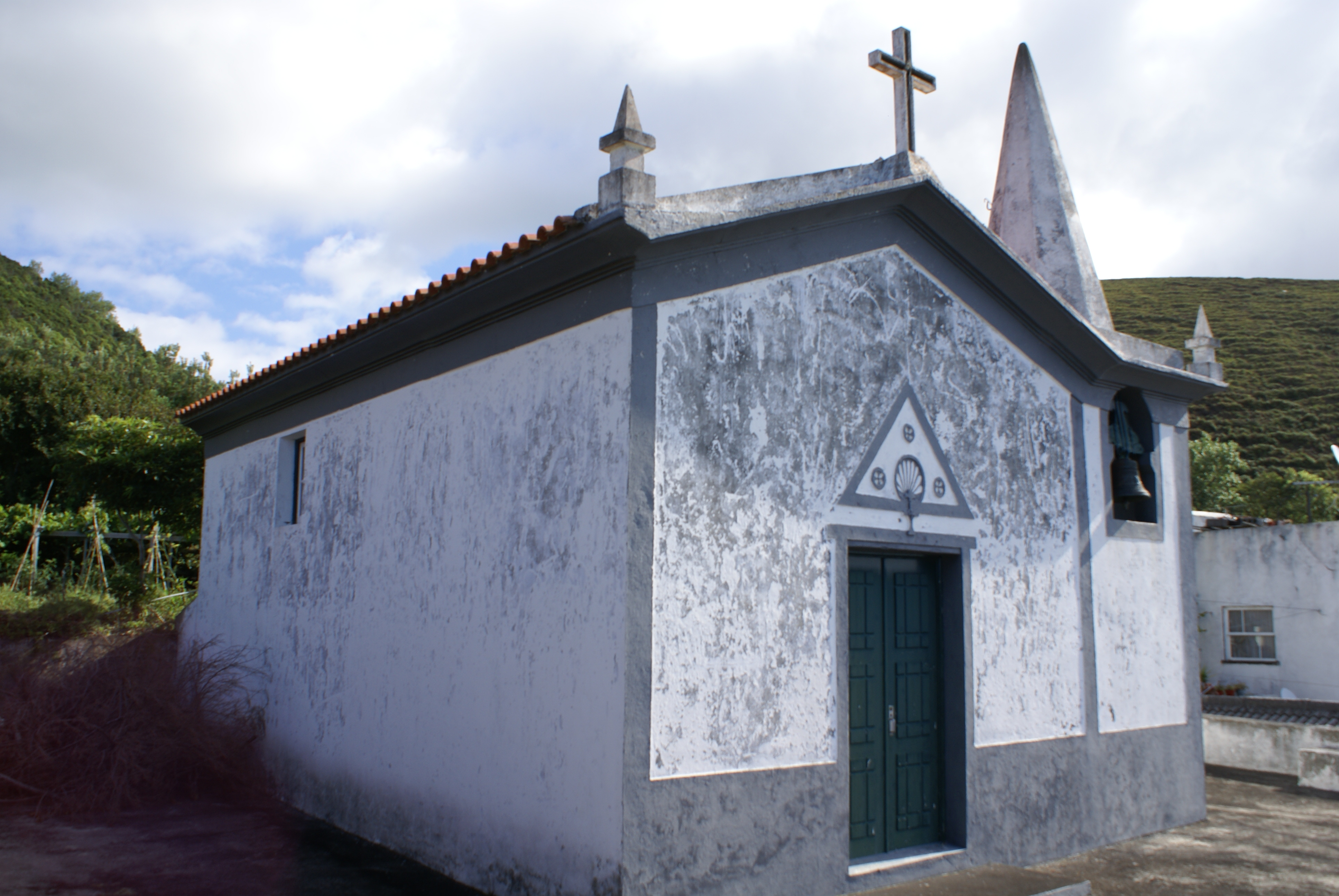 Ermida de Nossa Senhora da Piedade (Velas), velas, ilha de São Jorge, Açores